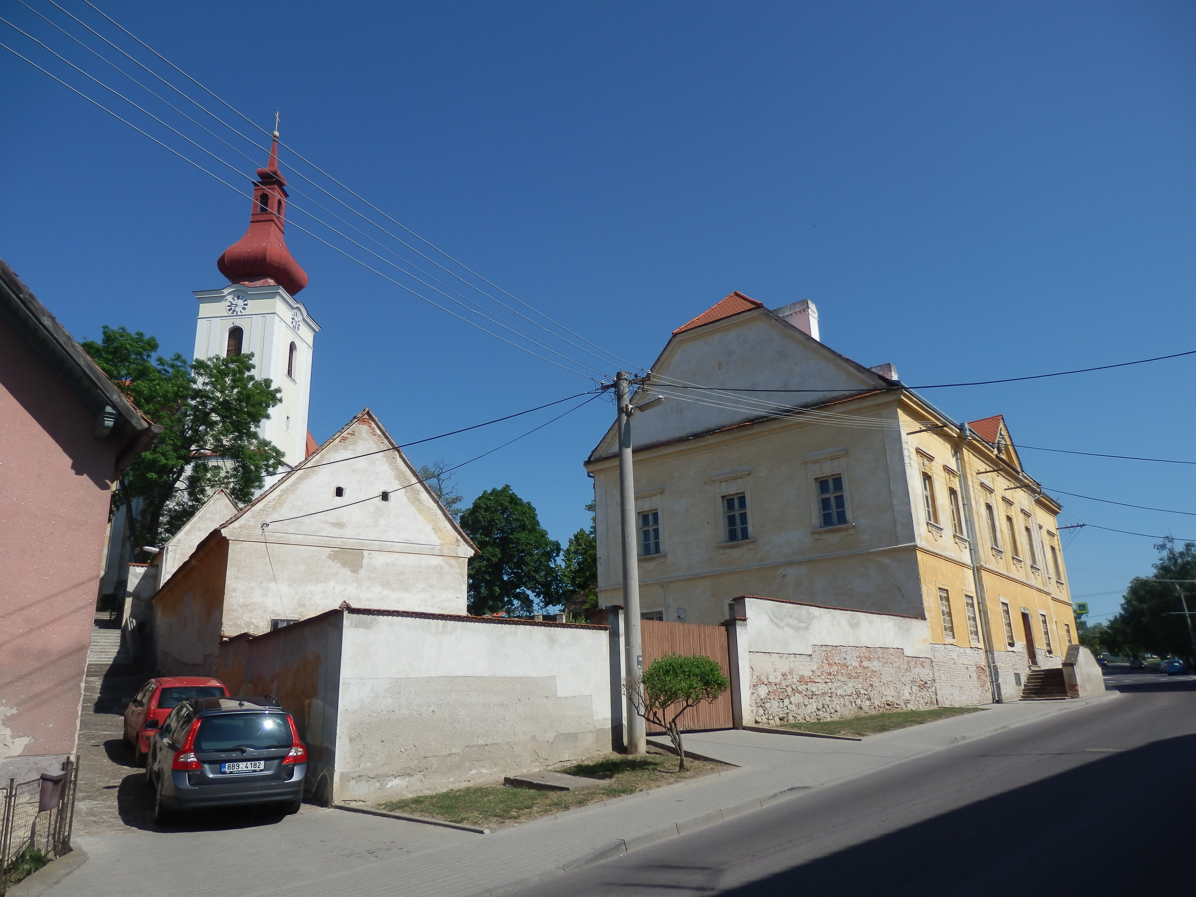 Fara, Tasovice 191, Tasovice (okres Znojmo).